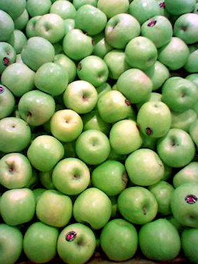 äpplen, foto av alers.